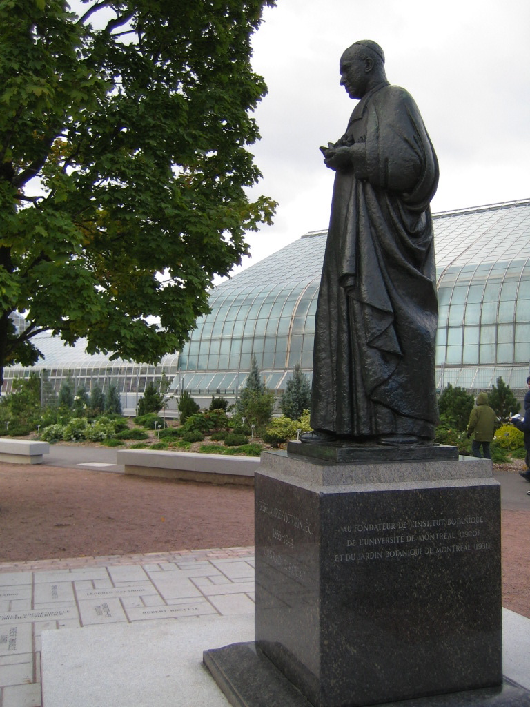 Statue of Frère Marie-Victorin, Montréal Botanical Gardens